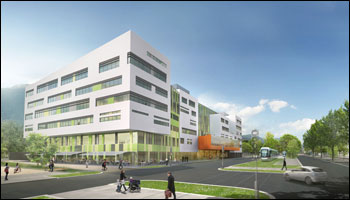 Vue du futur bâtiment GreEn-Er